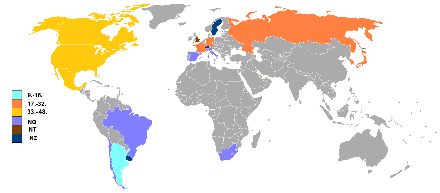 Beste Platzierung der tunesischen Mannschaft in den Austragungsländern der FIFA-Fußballweltmeisterschaften